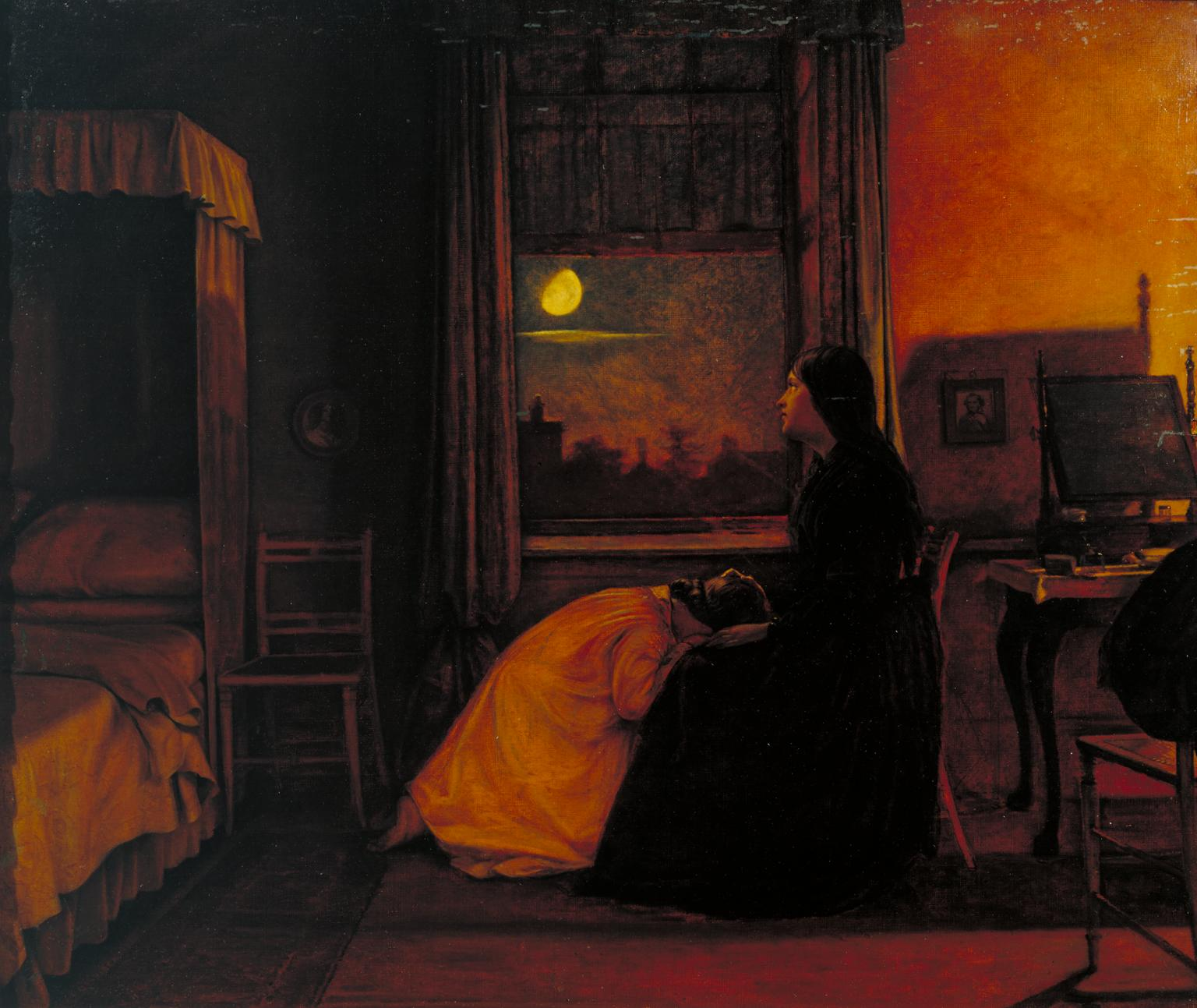 Wikipedia page